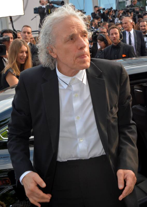 Abel Ferrara au festival de Cannes